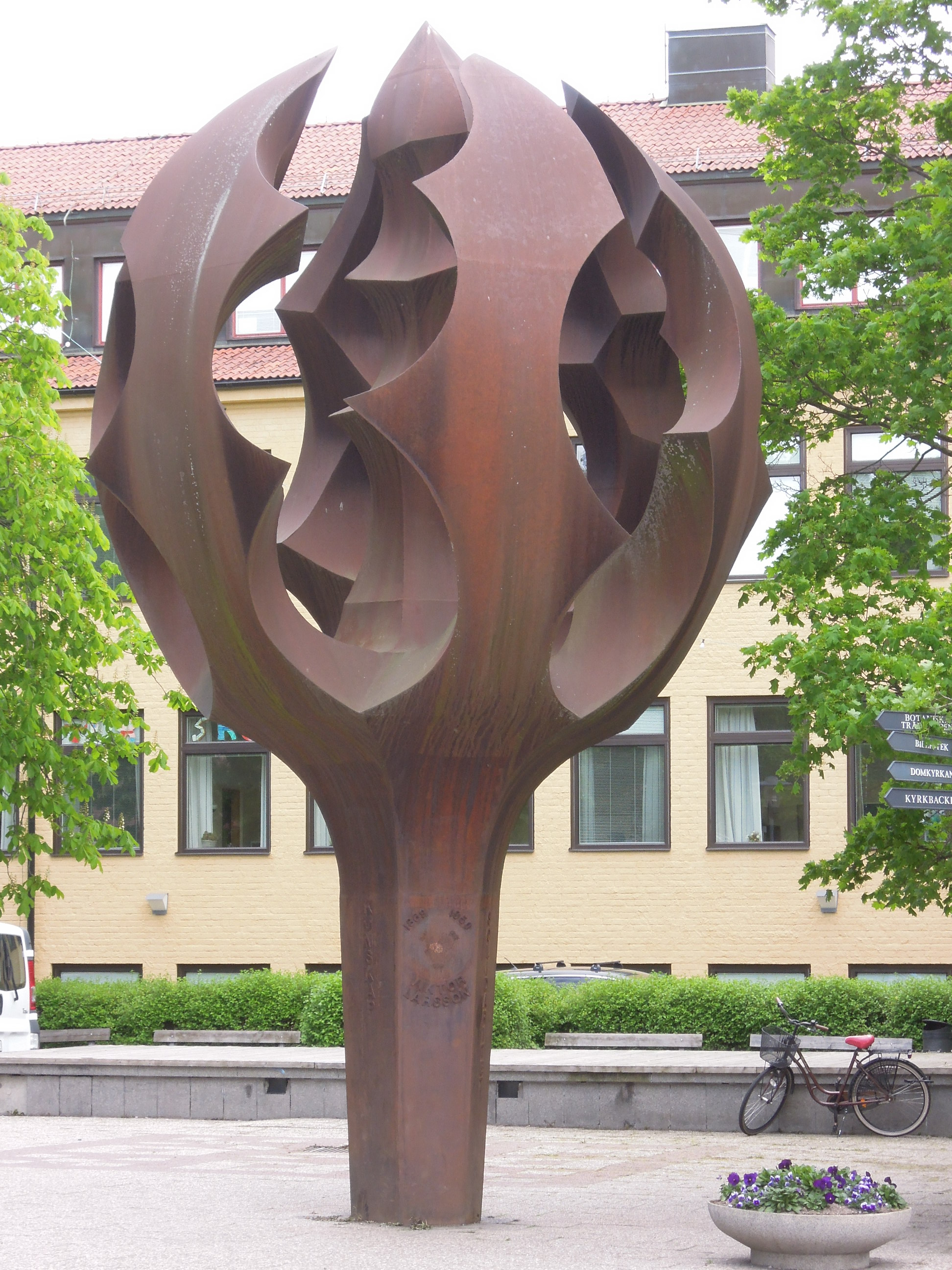 Kunskapens träd. Carl-Emil Berglin, 1981, cortenstål. Växhuset, Kopparbergsvägen Västerås